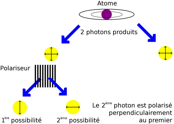 Schémas illustrant l'intrication de 2 photons Source : créée pour compléter l'article Paradoxe_EPR. Statut : image dans le domaine public.